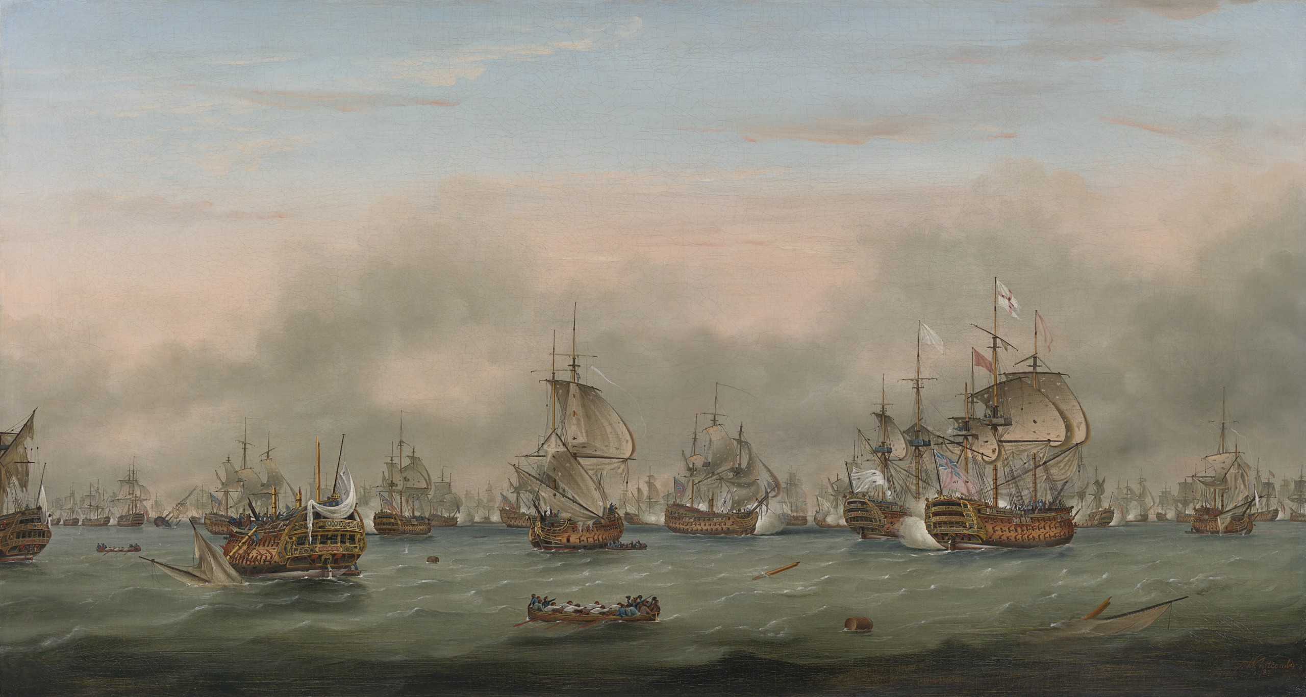 Vue générale de la bataille des Saintes, le 12 avril 1782 au large de la Guadeloupe.